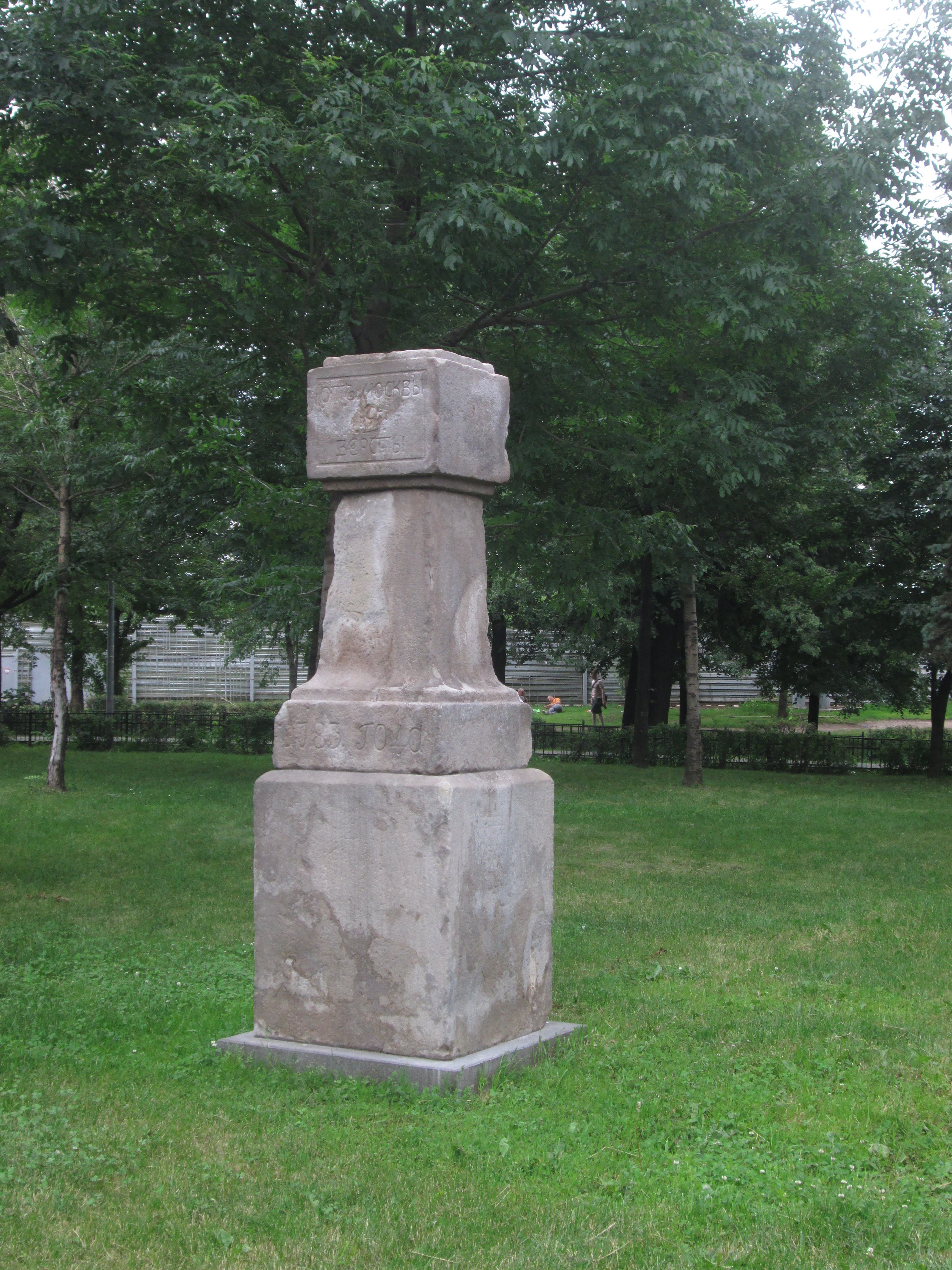 Верстовой столб на Старой Владимирской дороге: Таганский, Центральный округ, Москва